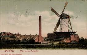 Noordendorpmolen te Enschede